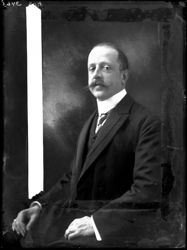 František Maria Harrach (1870–1937)